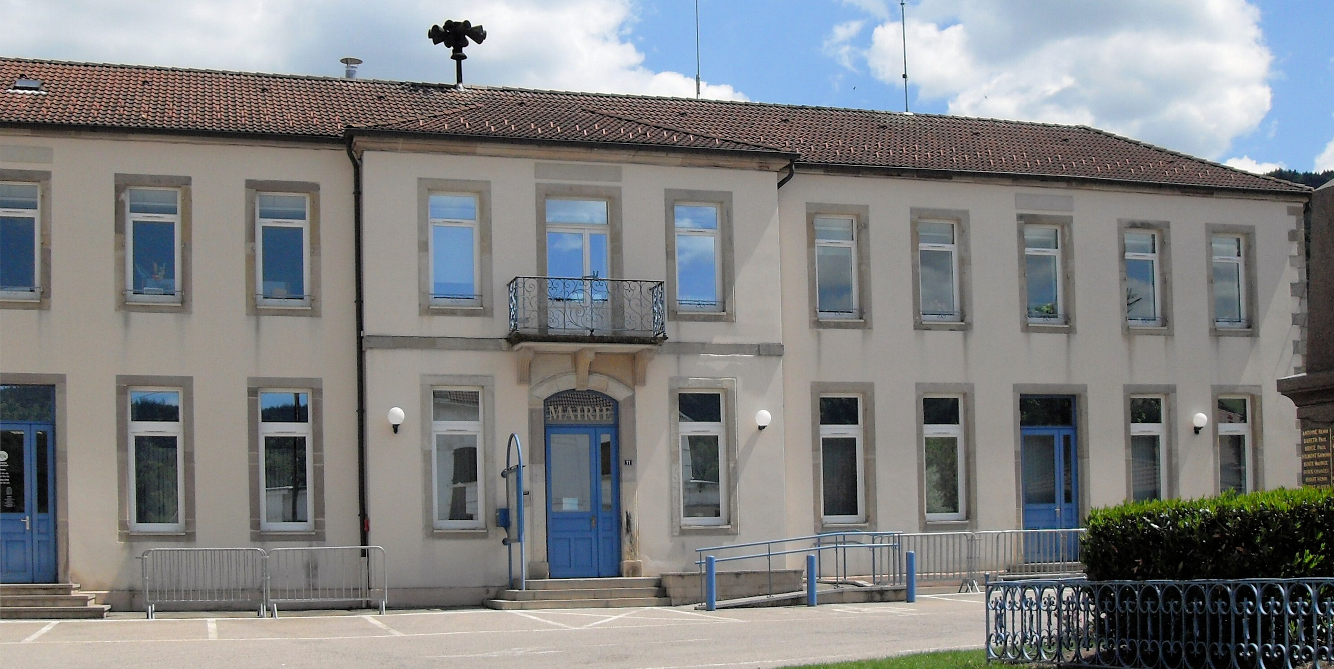 La mairie de Vecoux